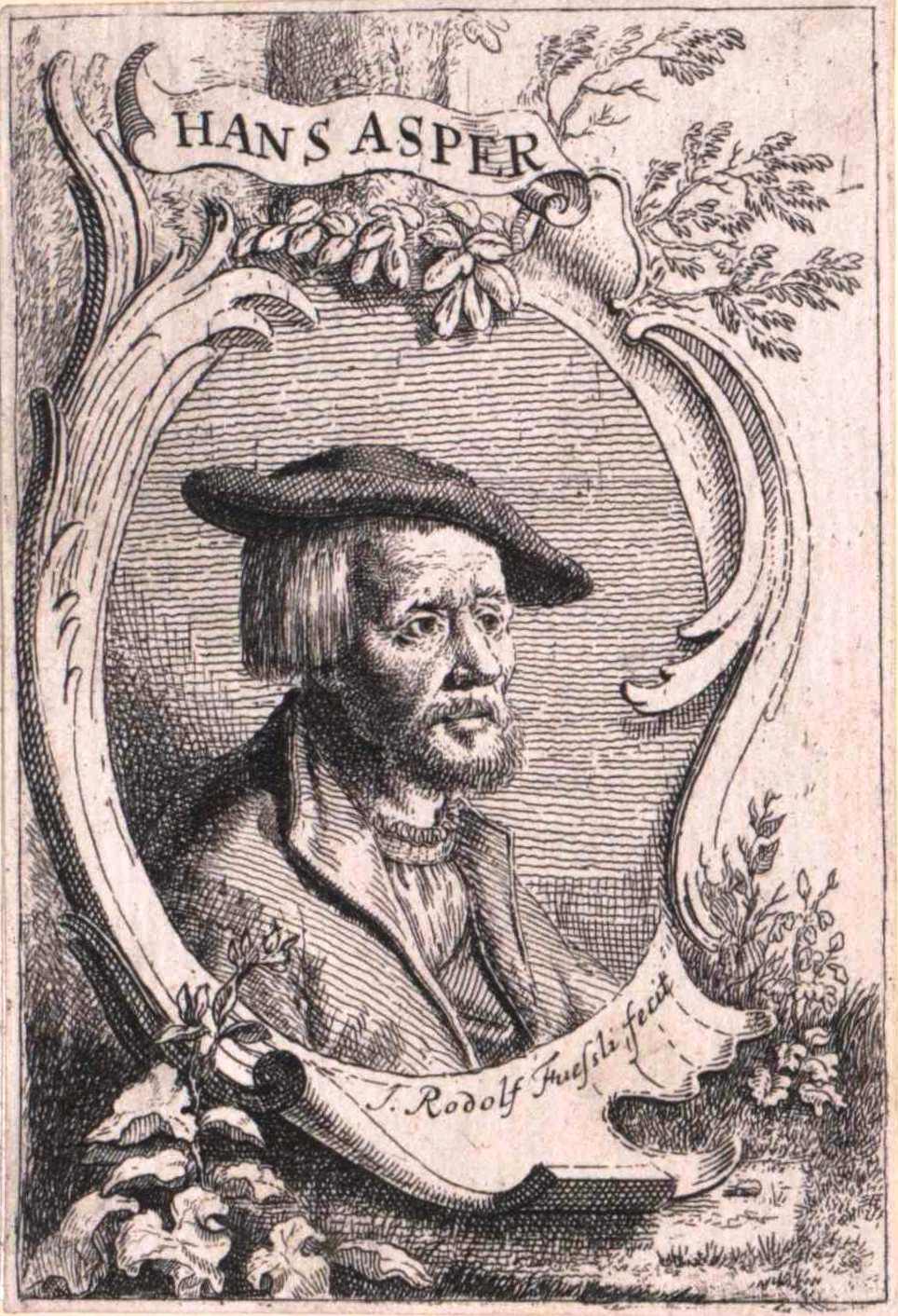 Portrait des Schweizer Malers Hans Asper.